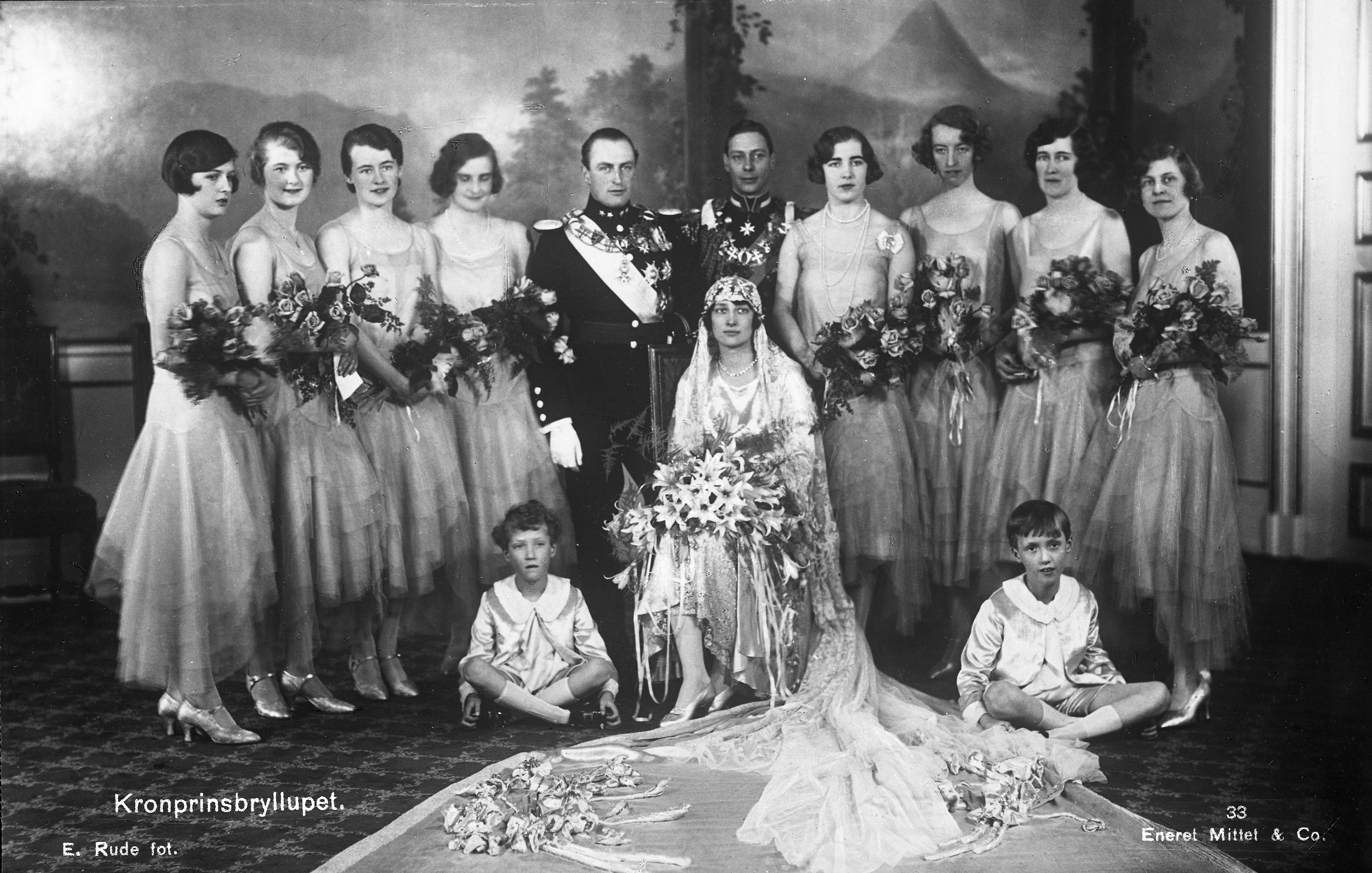 Bildet er hentet fra Arkivverket. Brudeparet kronprinsesse Märtha og kronprins Olav med forlover og brudepiker. Arkivinstitusjon : Riksarkivet Arkivnavn : Mittet & Co. A/S Sted : Norge, Oslo, Oslo, Emneord: Kongelige, Bryllup Avbildet